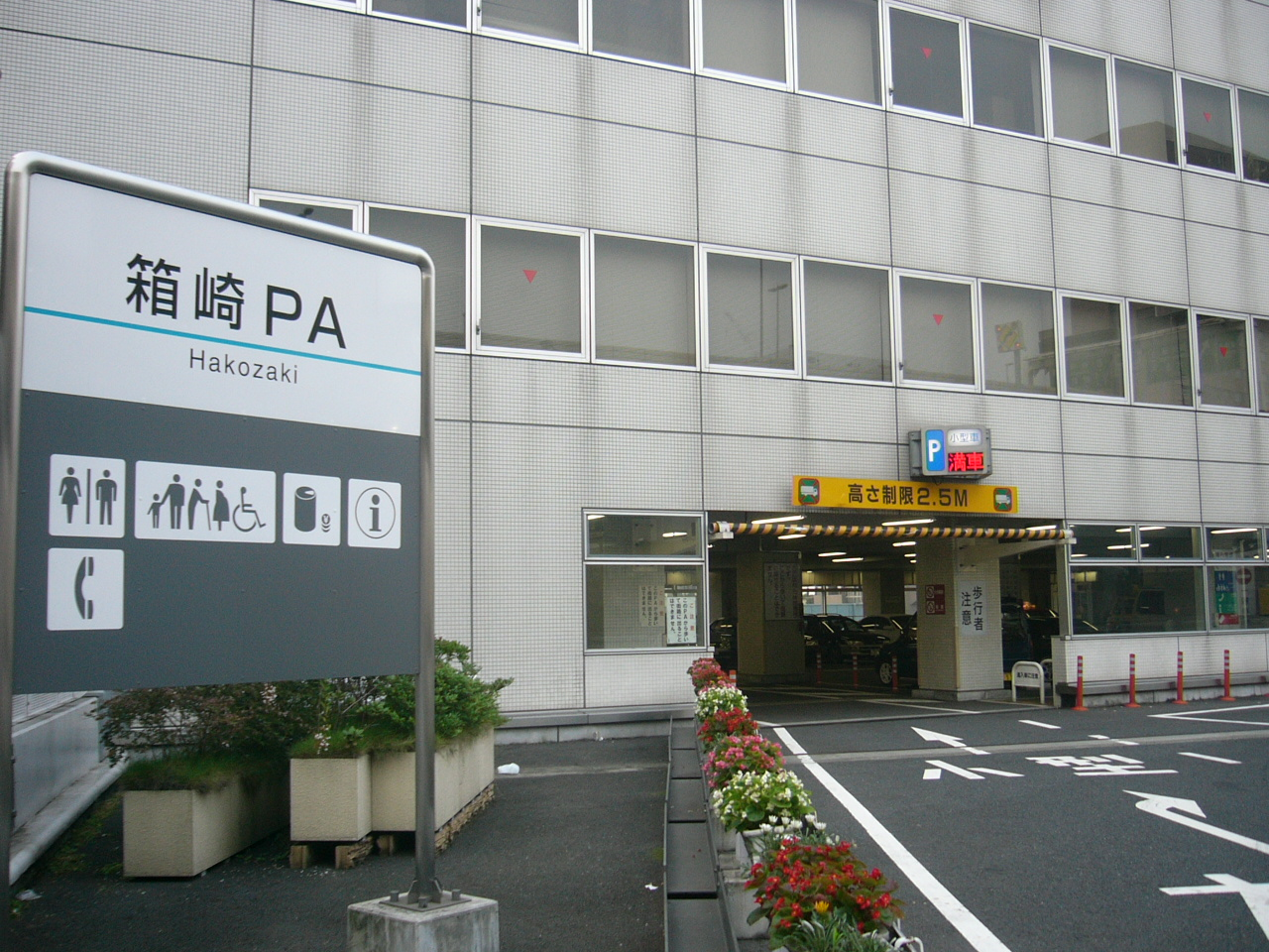 Hakozaki Parking Area